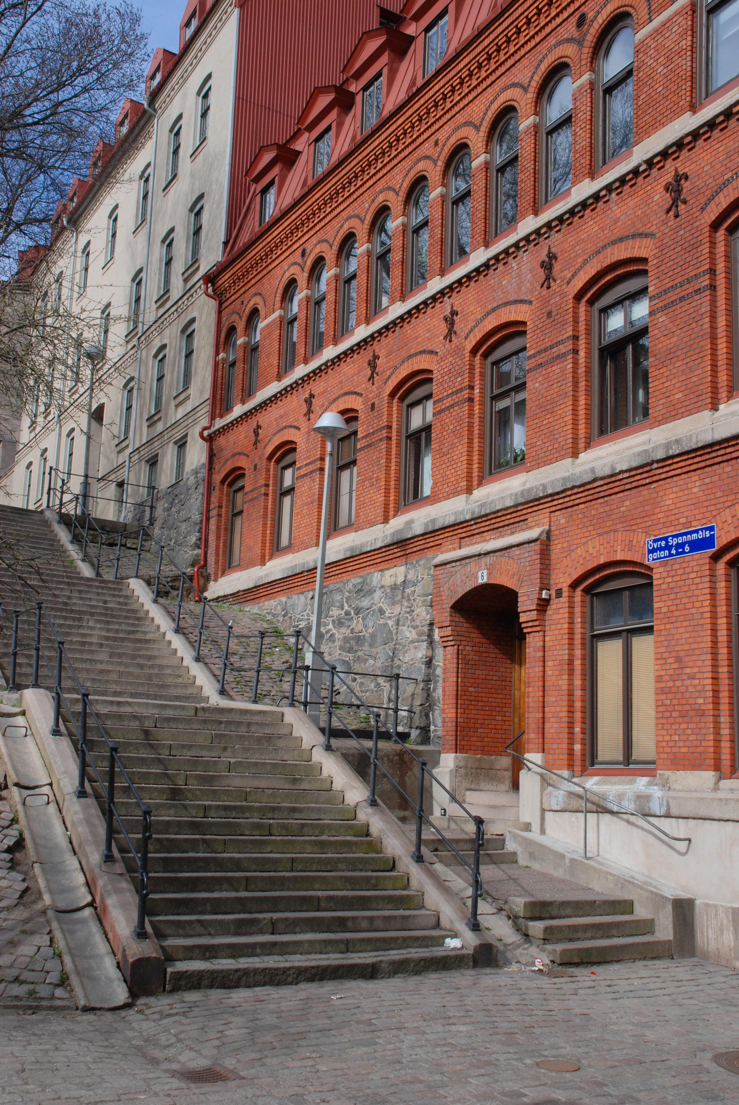 Övre Spannmålsgatan från Nedre Kvarnbergsgatan. Den röda tegelbyggnaden är den tidigare skofabriken för Bergmark & Co.